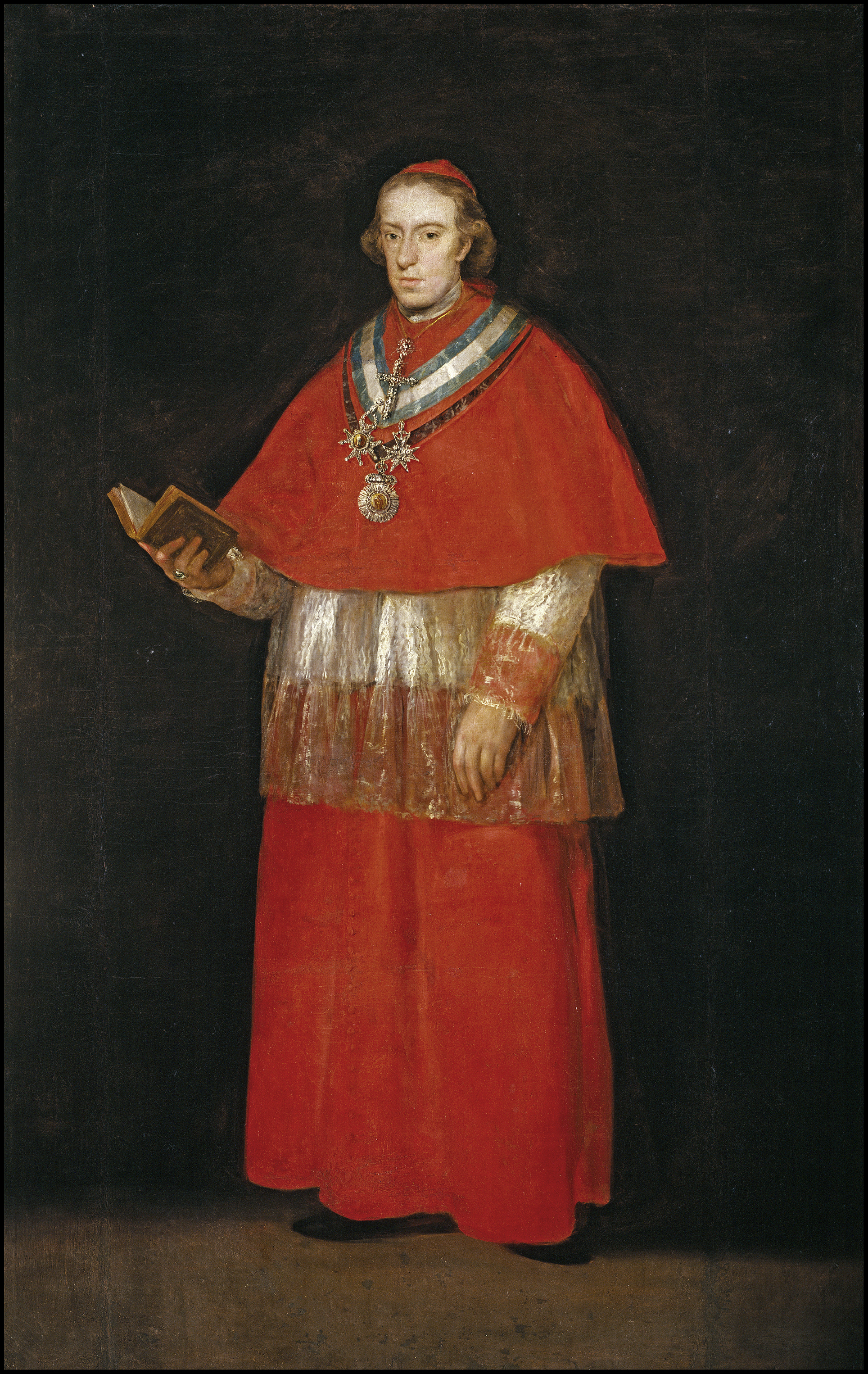 Retrato del cardenal español Luis María de Borbón y Vallabriga (1777-1823), que era hijo del infante Luis de Borbón y Farnesio y nieto del rey Felipe V de España. Fue arzobispo de Sevilla y también de Toledo y murió en Madrid el día 18 de marzo de 1823. Además, hay constancia de que existen varias réplicas y versiones de este retrato oficial, que coincide en su técnica con las obras de Agustín Esteve, aunque el original e indubitado de Goya se conserva el Museo de Arte de São Paulo de Brasil.